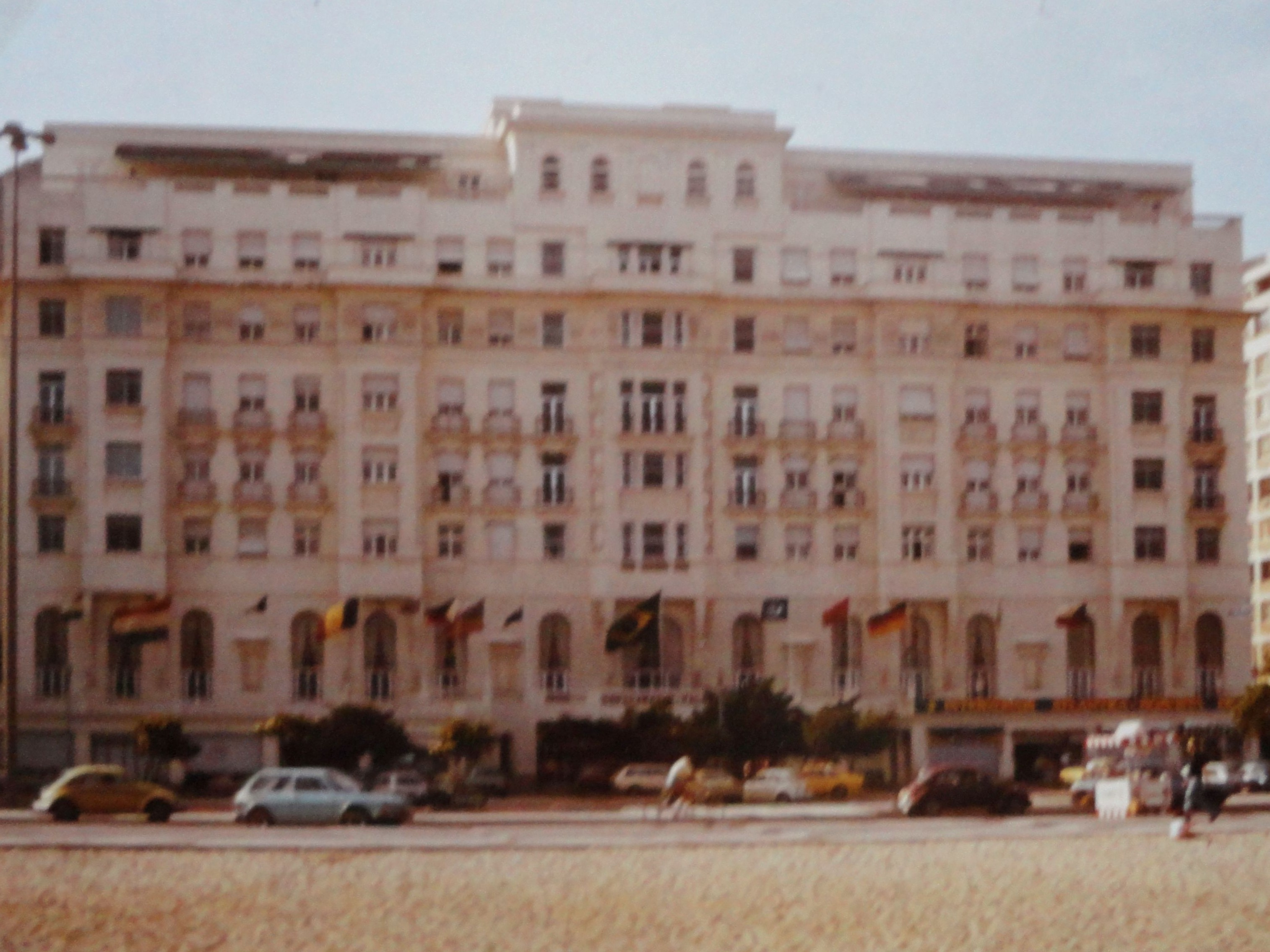 Das Hotel "Copacabana Palace" in Rio de Janeiro, Austragungsort der Interzonenturniere 1979 als Etappe zur Schachweltmeisterschaft.